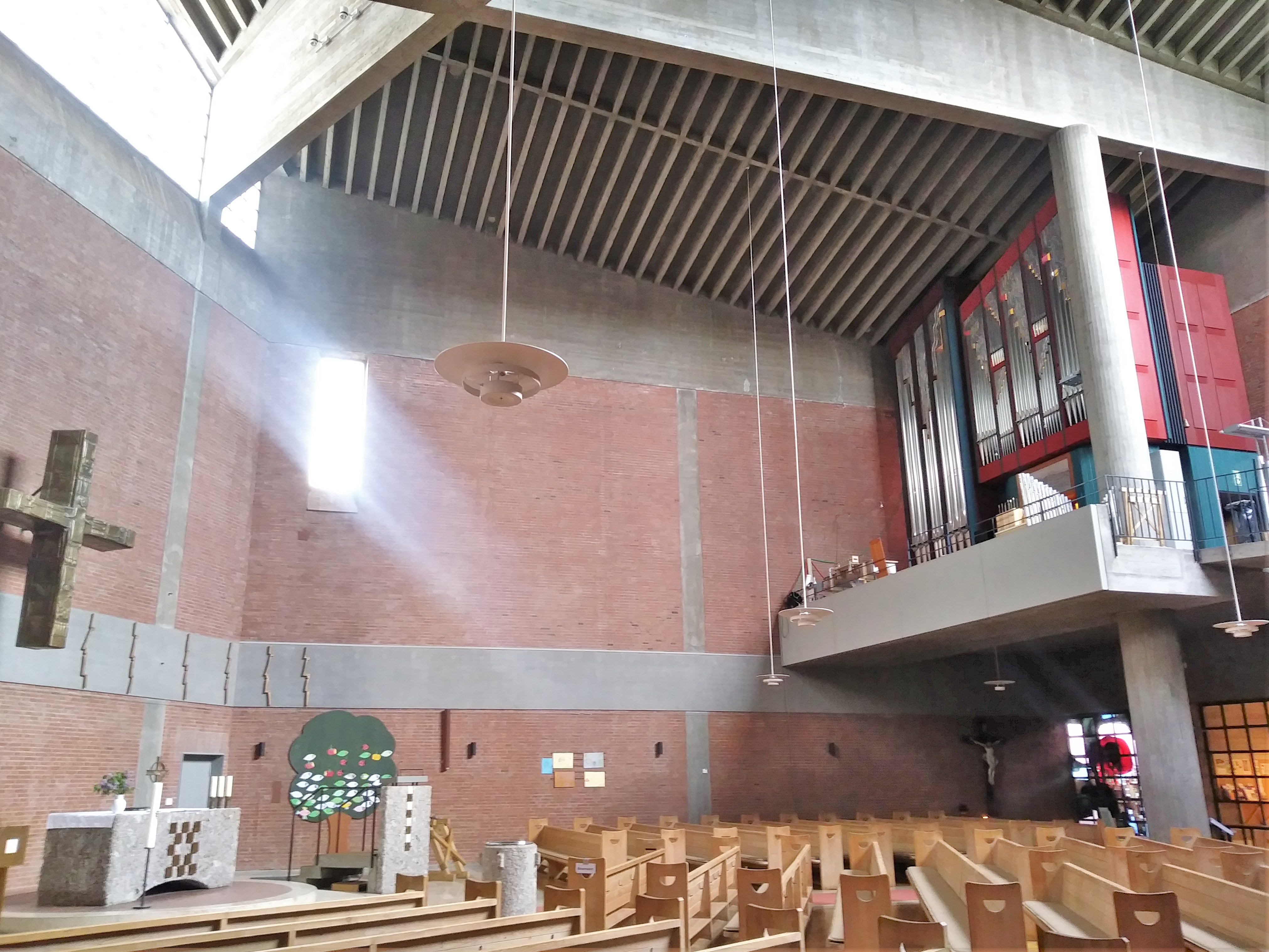 St. Michael (Ottobrunn)